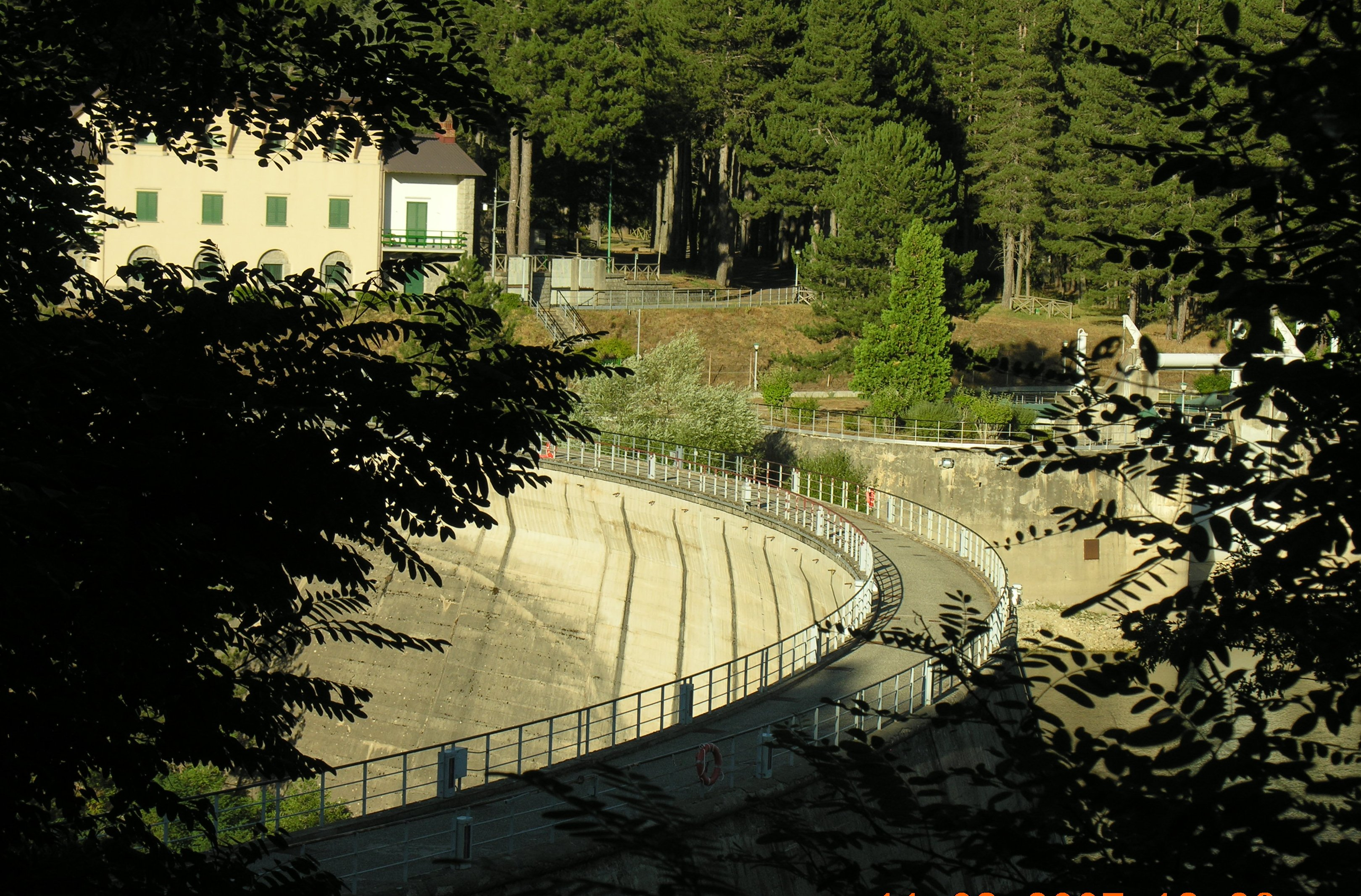 Altra veduta della diga di Cecìta dal lato sinistro